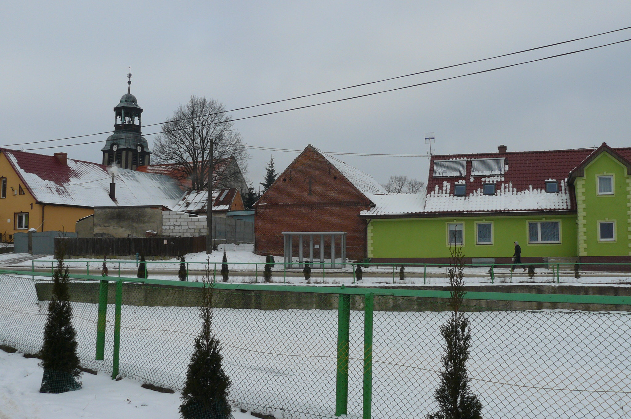 Nowogródek Pomorski - centrum.